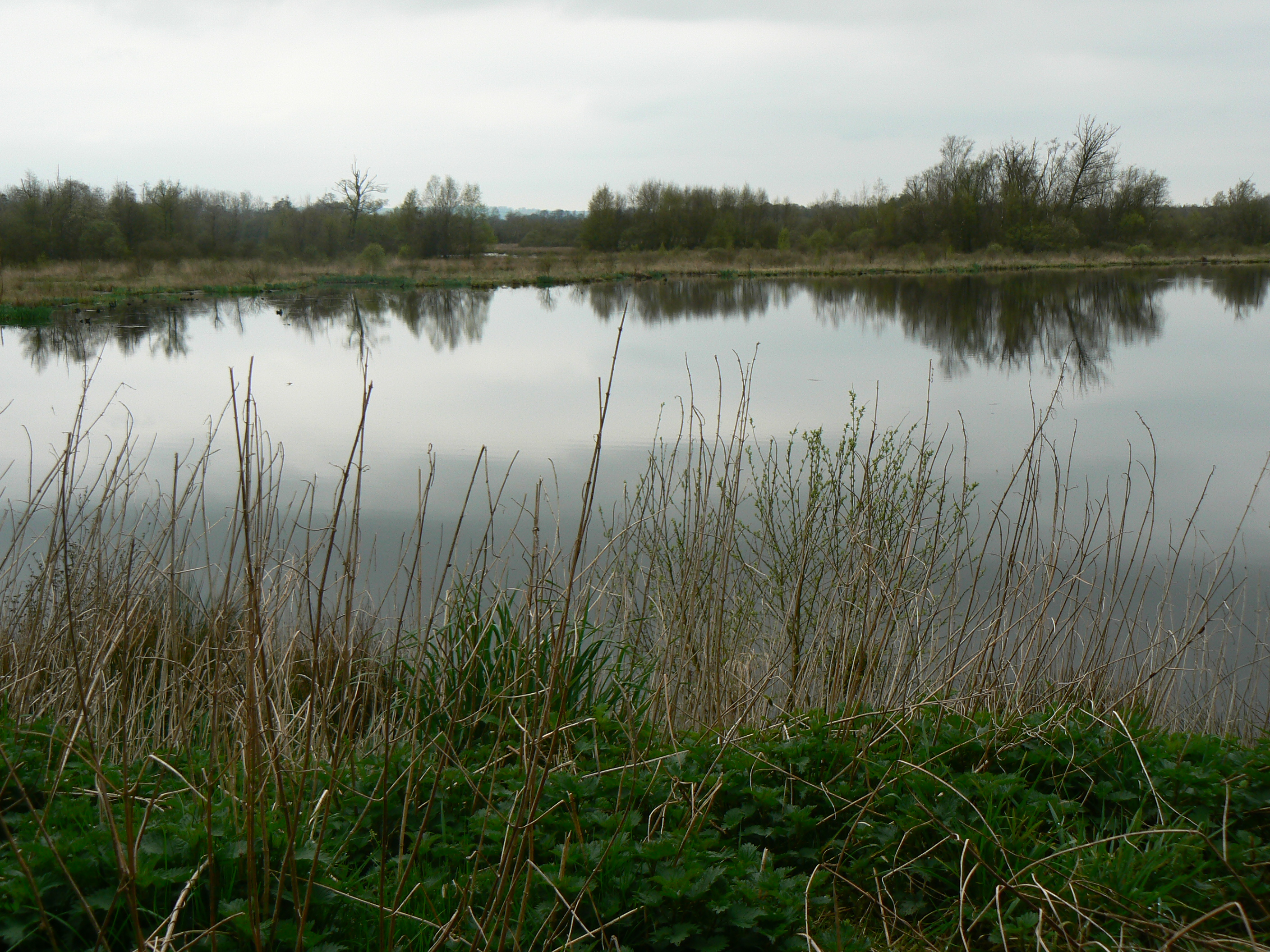 Marais du Grand Hazé de Briouze (61) depuis le point d'observation ornithologique